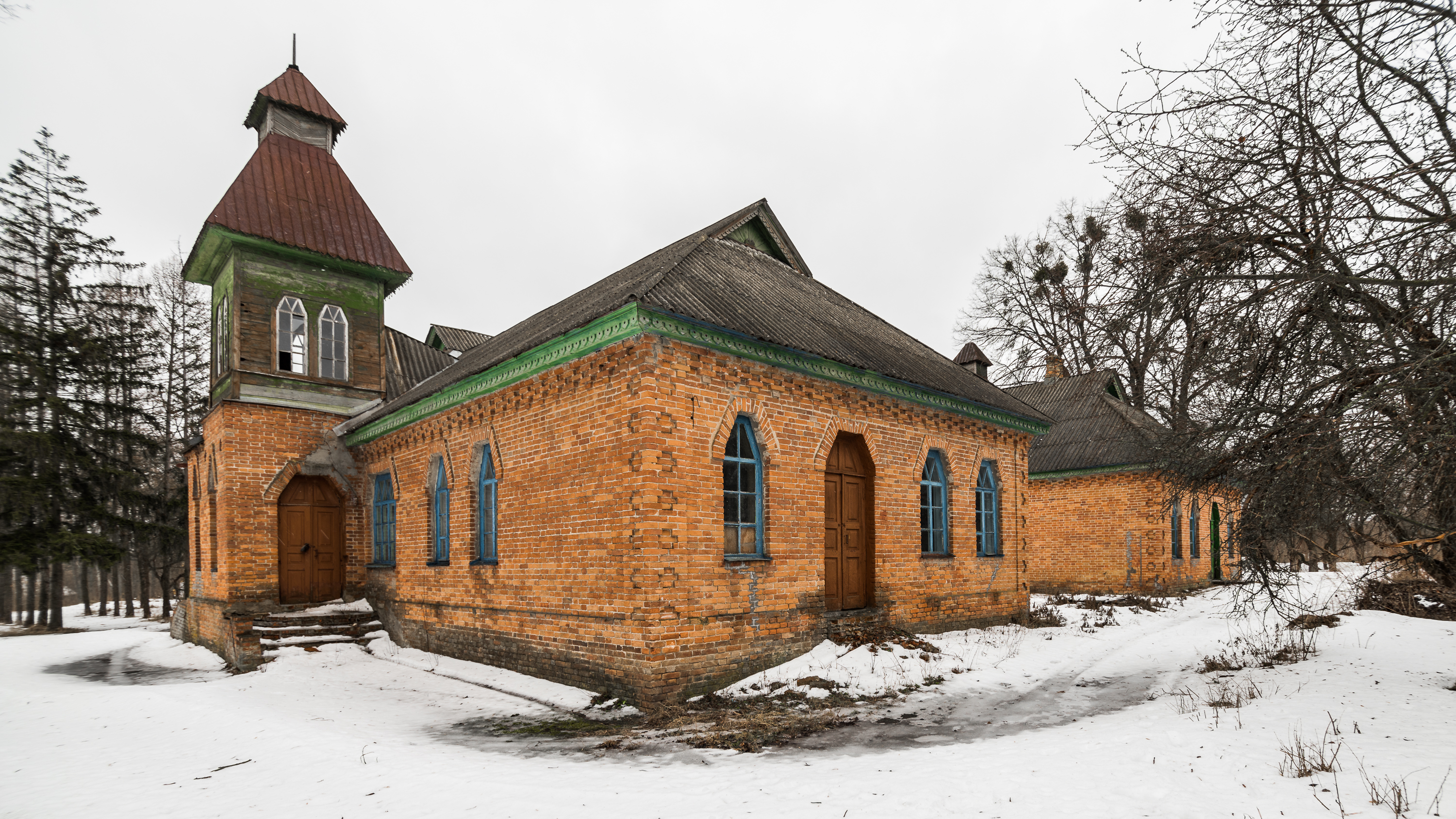 Трикомплектна земська школа в селі Бондарі Чорнухинського району Полтавської області. Стиль - український архітектурний модерн. Архітектор Опанас Сластьон.